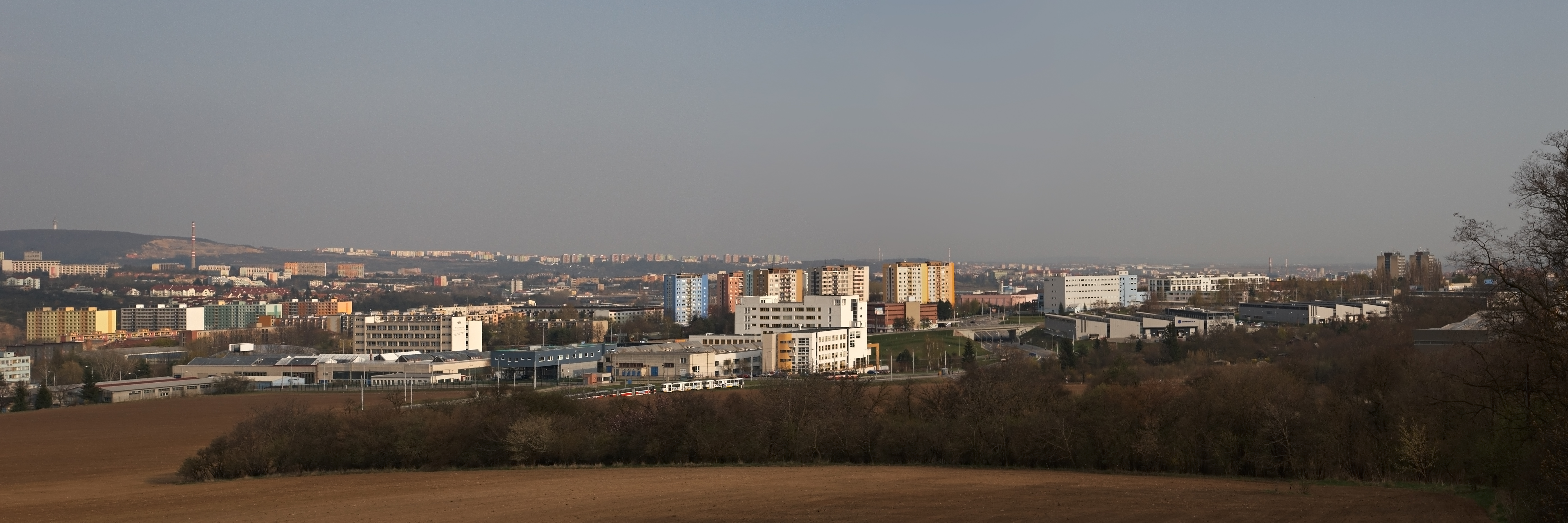 Česky: Pohled na Královo Pole ze severoseverozápadu